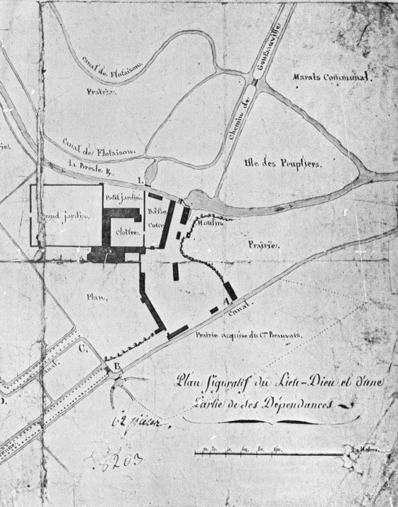 Plan dressé au dix-huitième siècle de l'abbaye du Lieu-Dieu (Somme) et de ses dépendances proches.